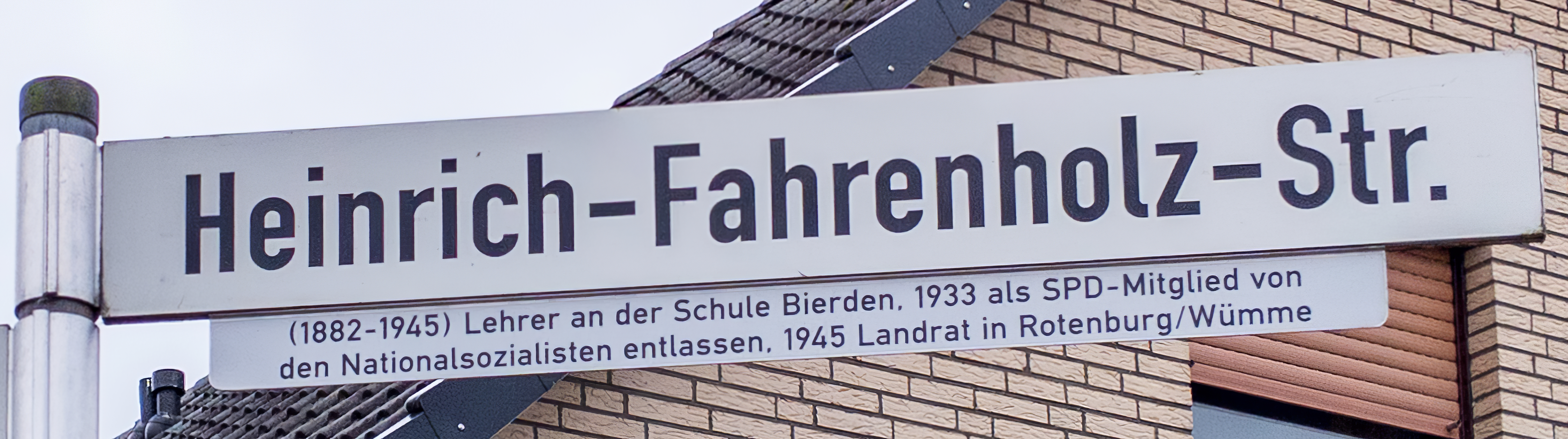 Straßenschild für die Heinrich-Fahrenholz-Straße in Achim-Bierden, aufgenommen im Februar 2020